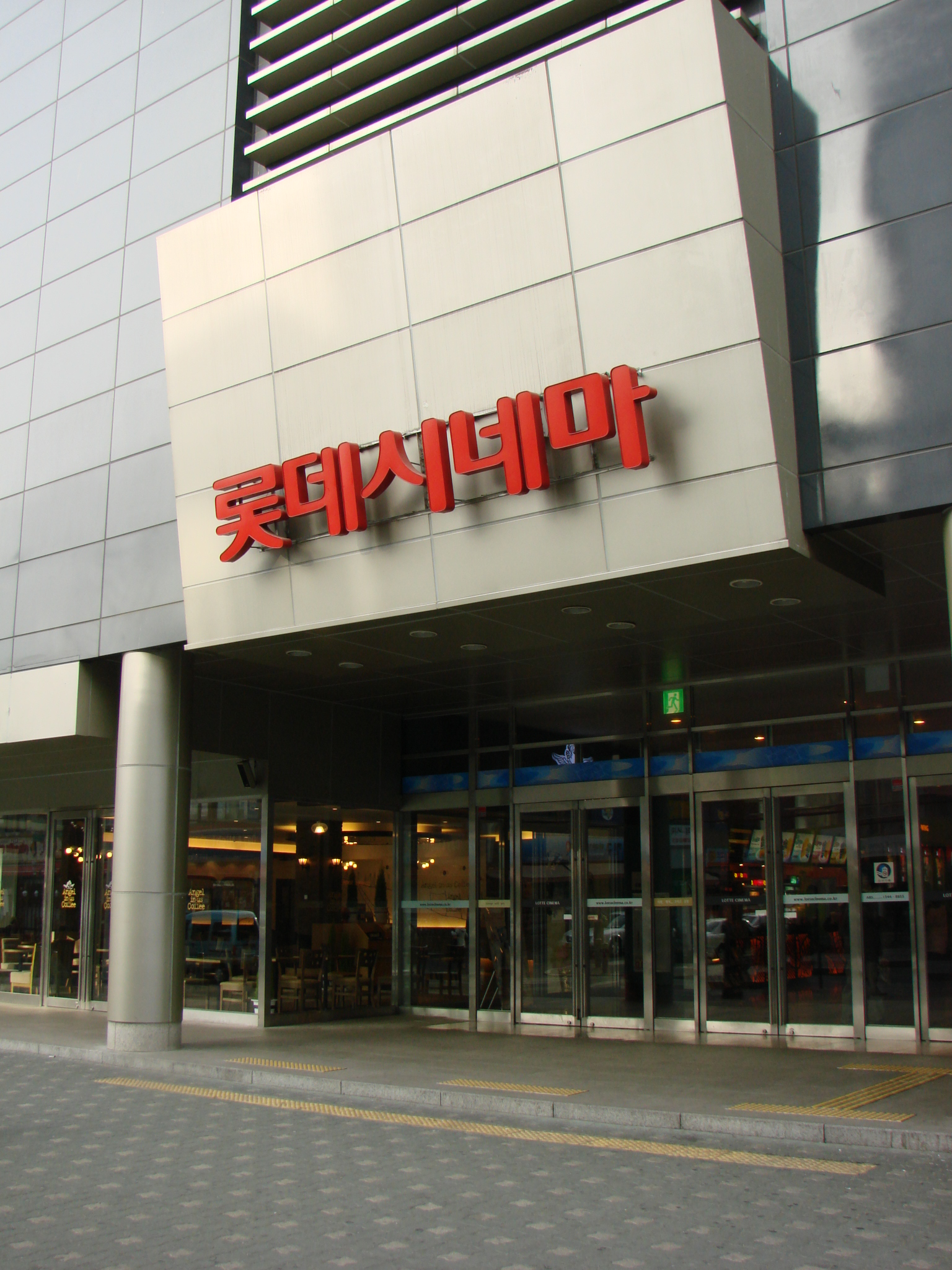 롯데시네마 강동